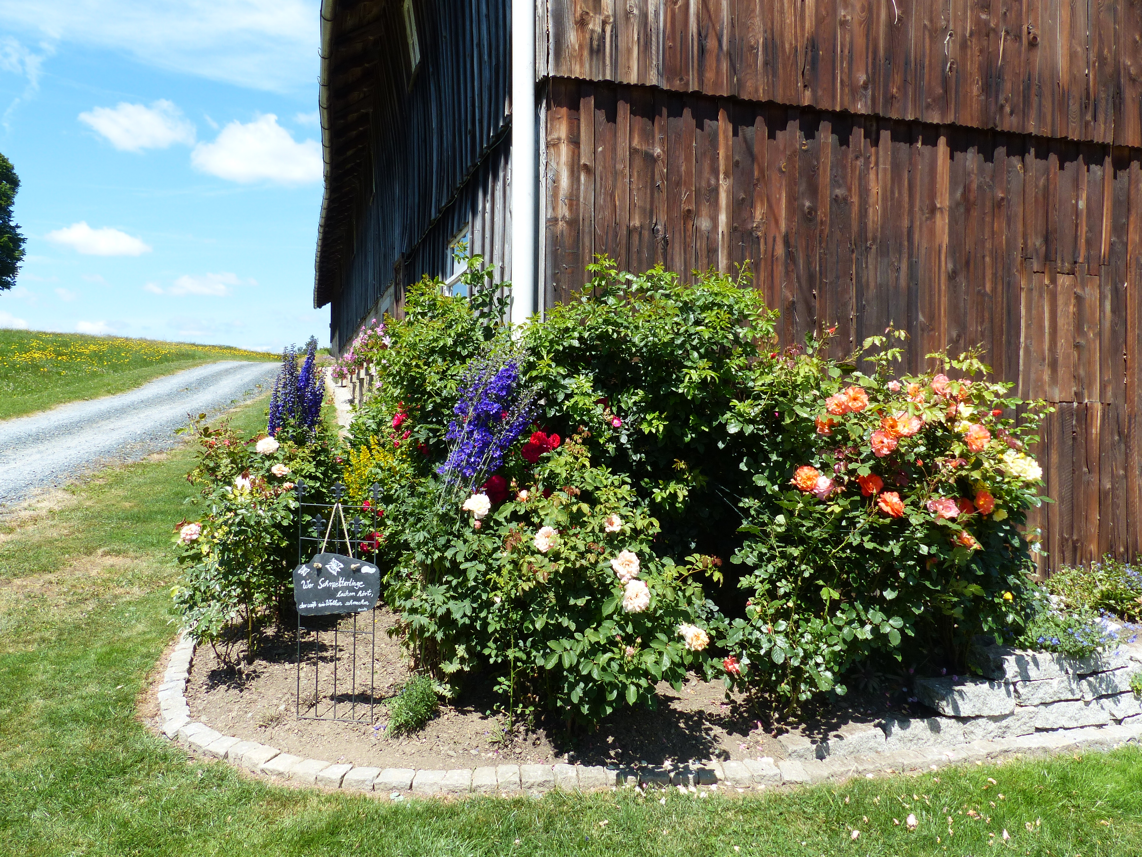 Götzmannsgrün, Ortsteil von Schwarzenbach an der Saale